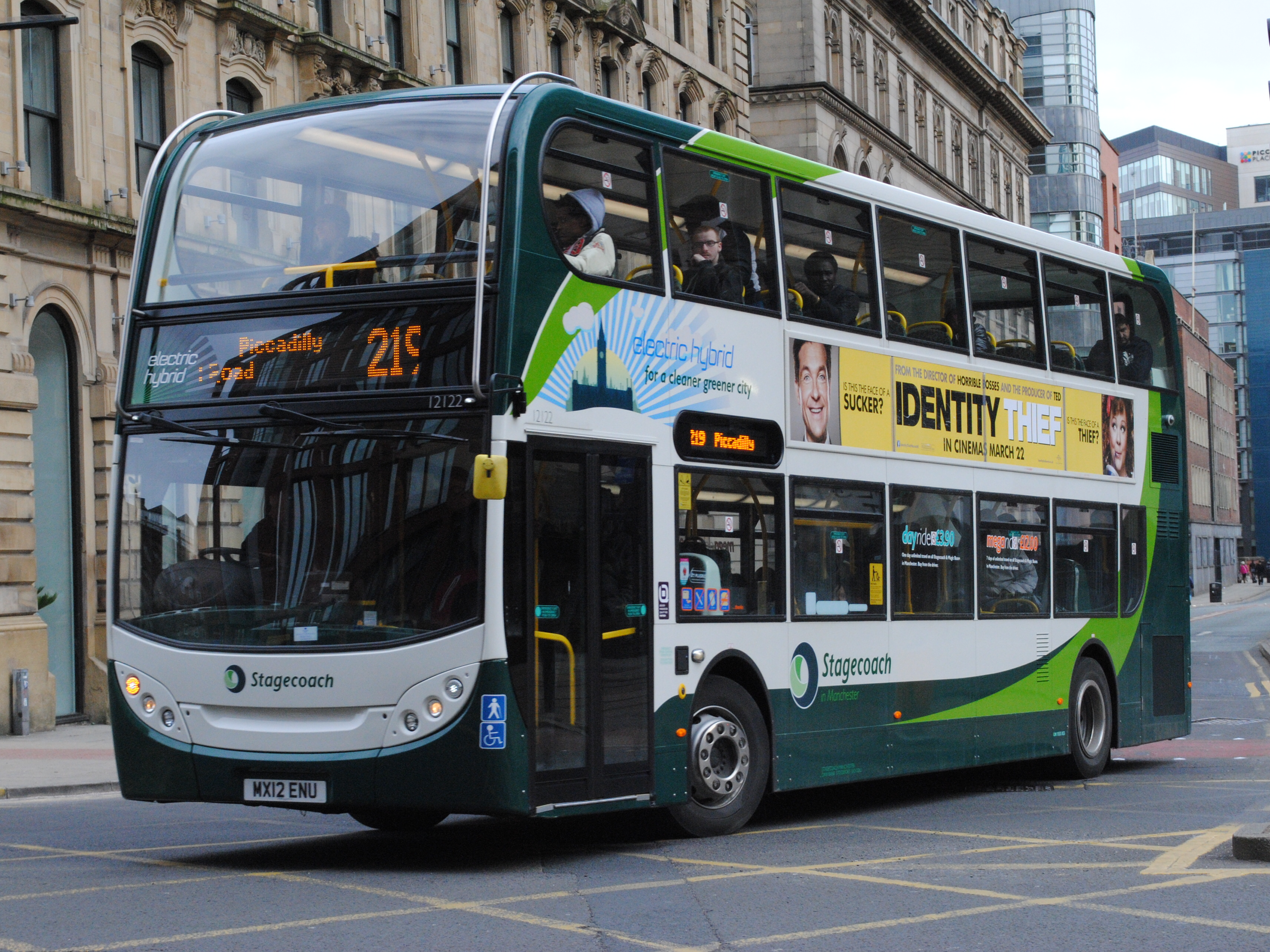 Alexander Dennis Enviro 400 Hybrid